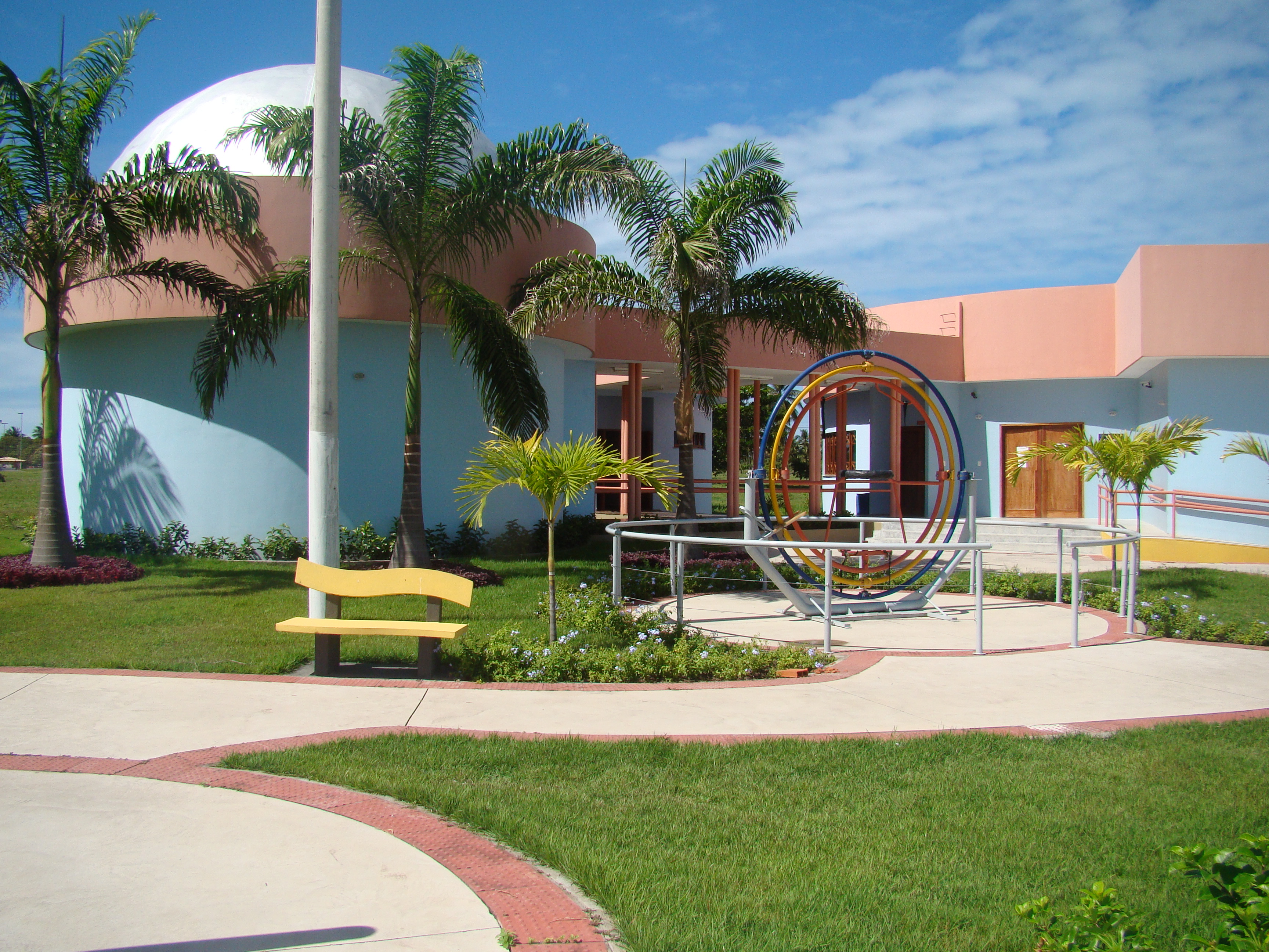 Área externa do planetária.